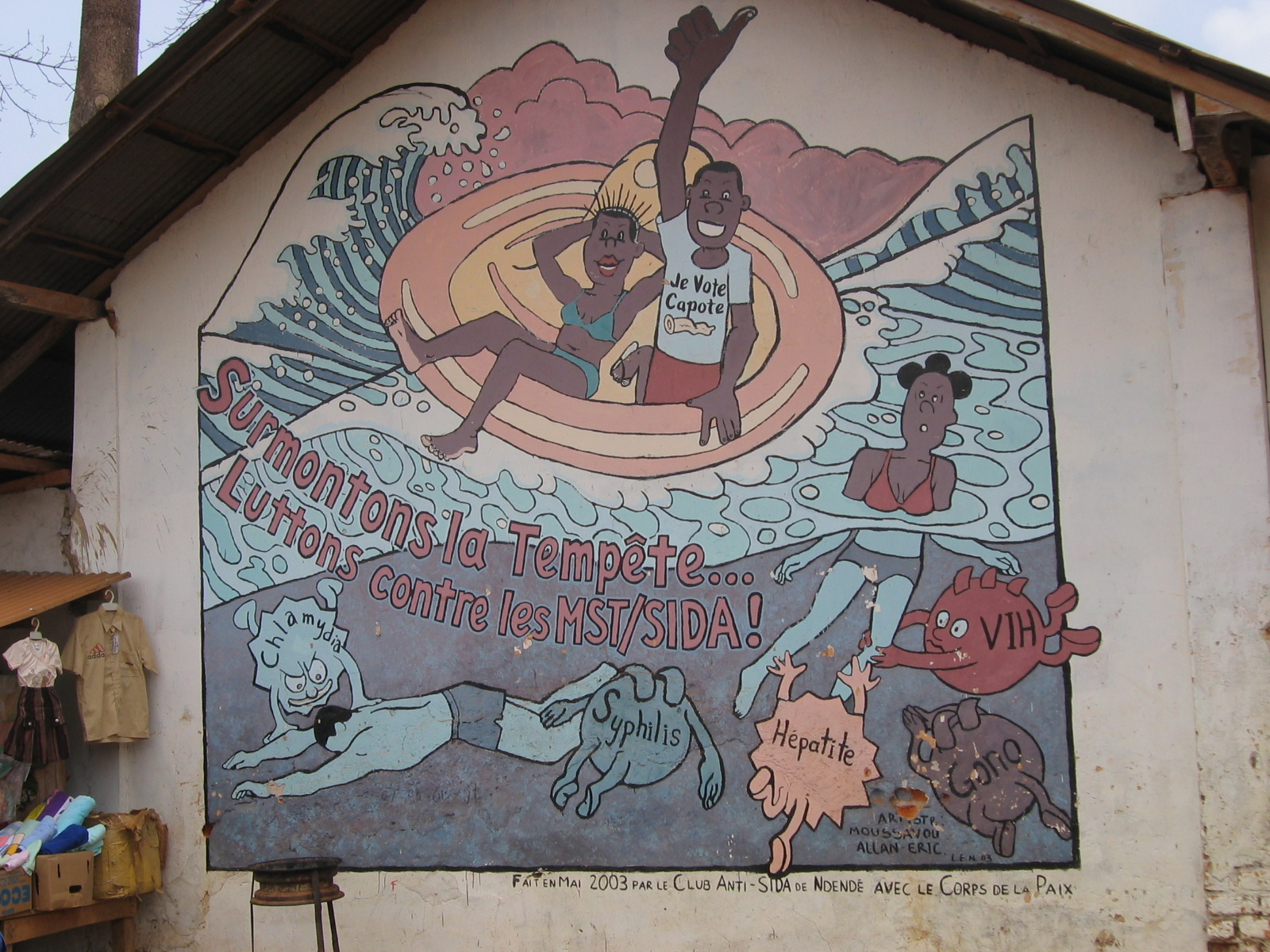 Fresque murale, lutte contre le SIDA, Ndendé, Gabon 2006